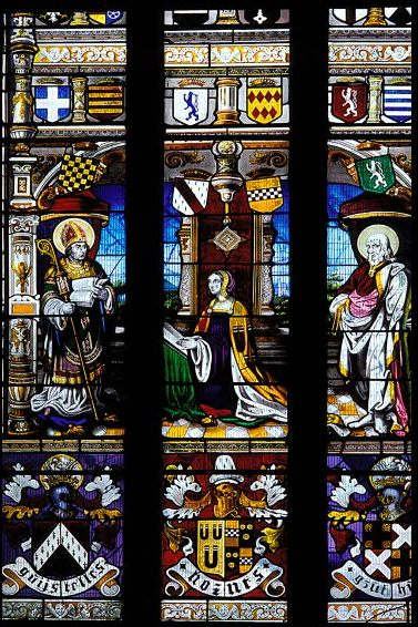 Glasraam St. Mary's churh, Shrewsbury (Engeland) met de wapenschilden van Jacob II van Horne en Johanna van Gruuthuse. Dit glasraam is oorspronkelijk afkomstig uit de kerk van het adellijk damesklooster te Munsterbilzen